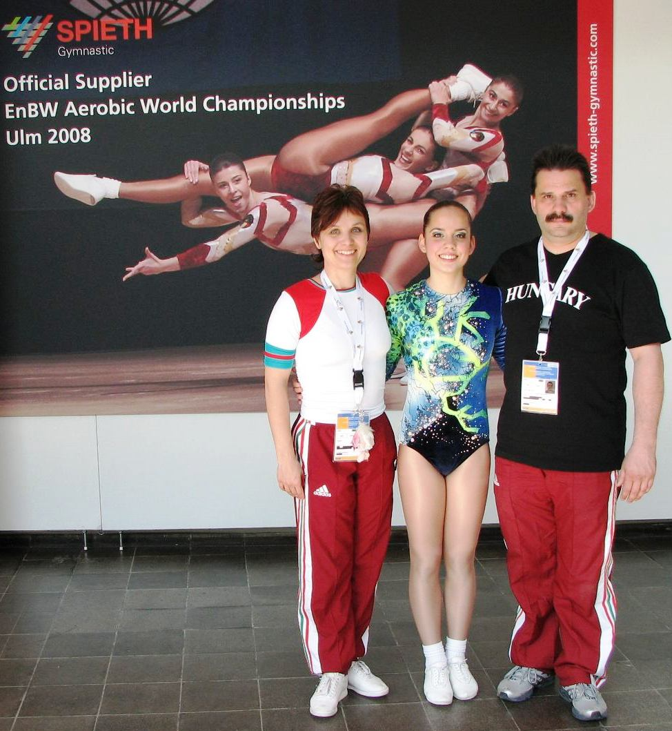 Bucsánszki Linda és szülei (edzői)